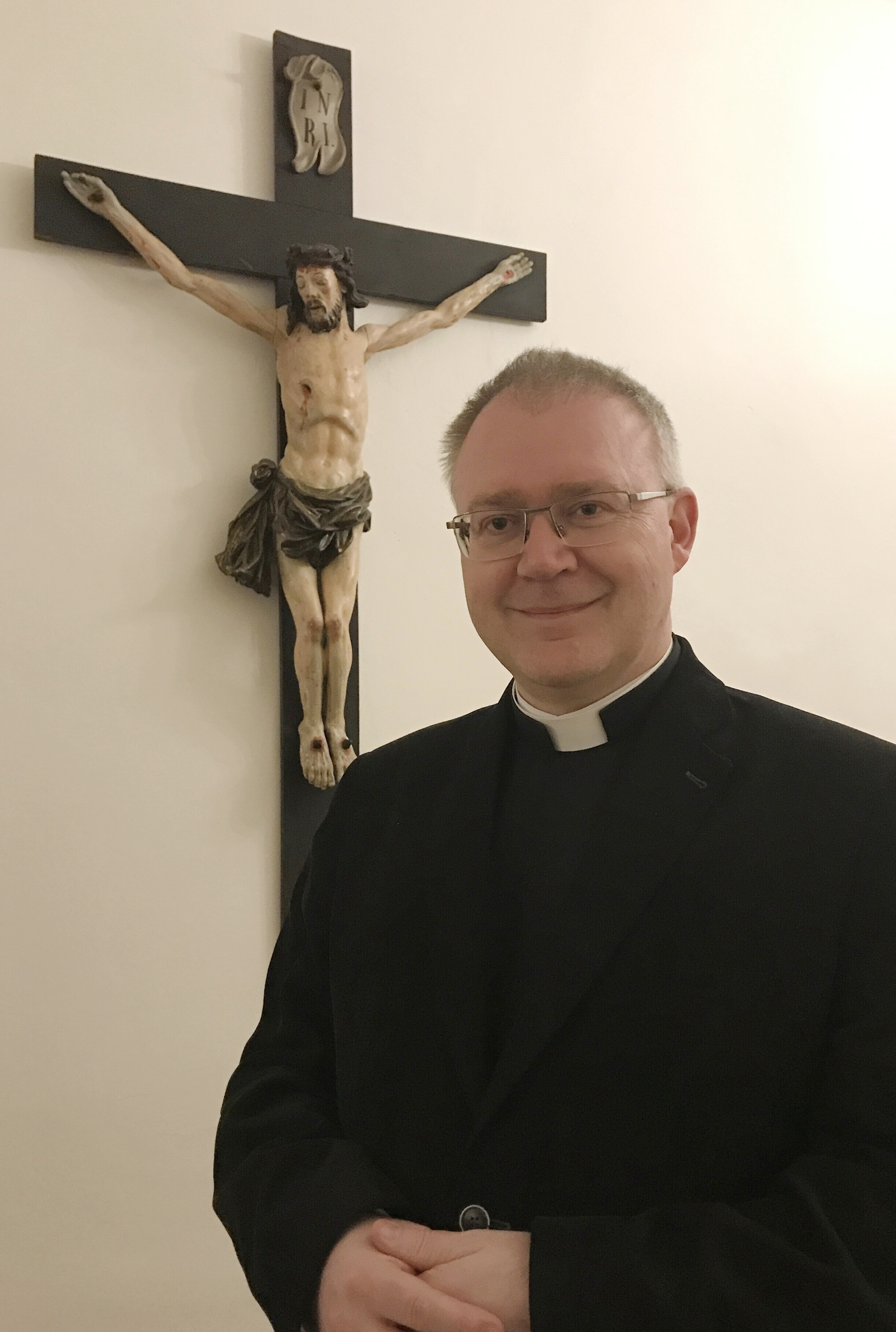 Mons. Martin Davídek, generální vikář litoměřické diecéze (duben, 2017)